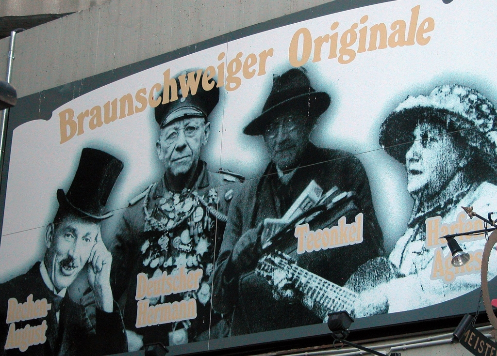 Fotomontage an einer Braunschweiger Hauswand: Sie zeigt von links nach rechts folgende Braunschweiger Originale: Rechen-August, Deutscher Hermann, Teeonkel und Harfen-Agnes.